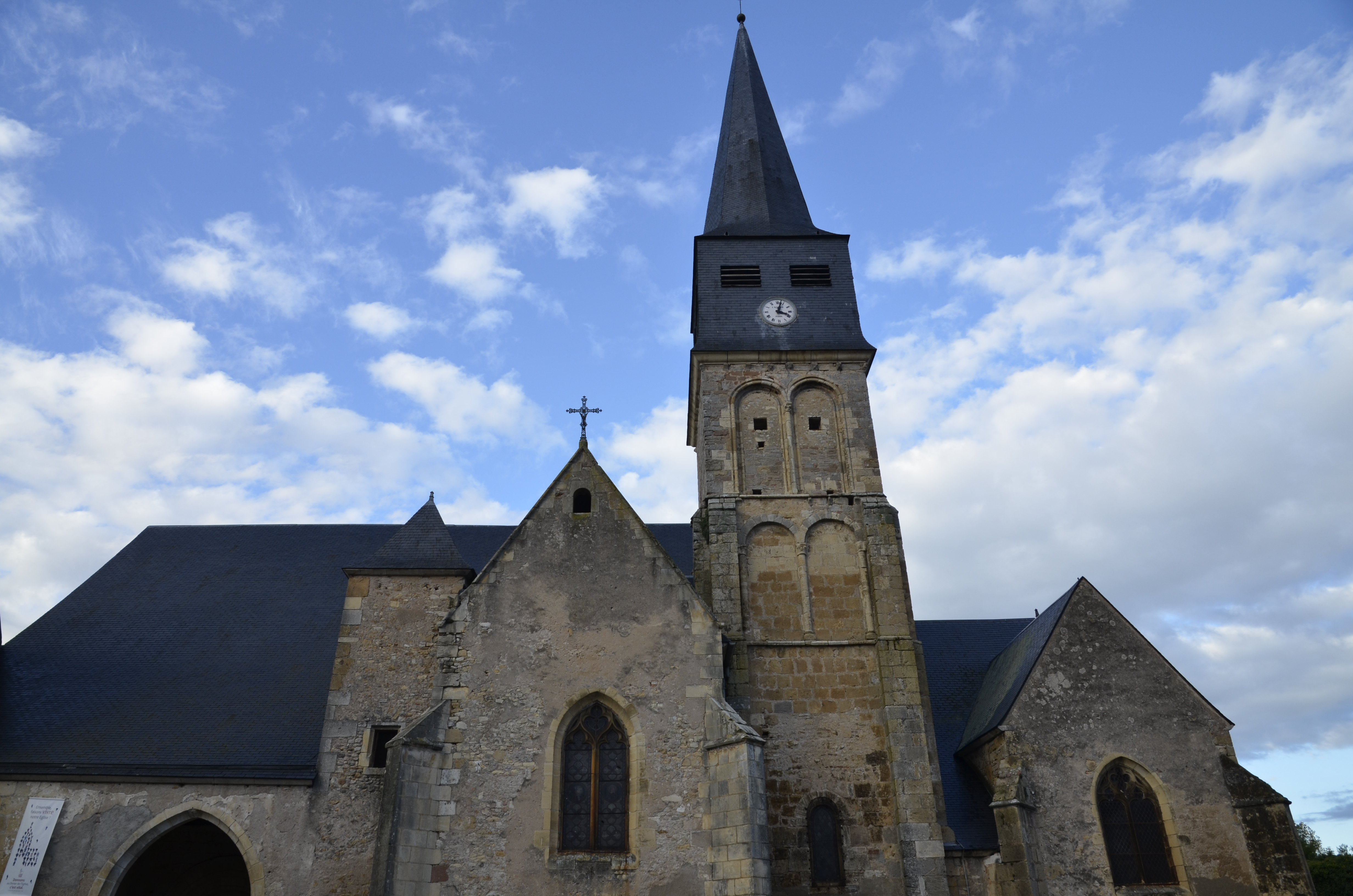 Vue générale de l'édifice, depuis la place.